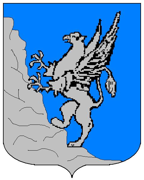 Grb obitelji Jeremija